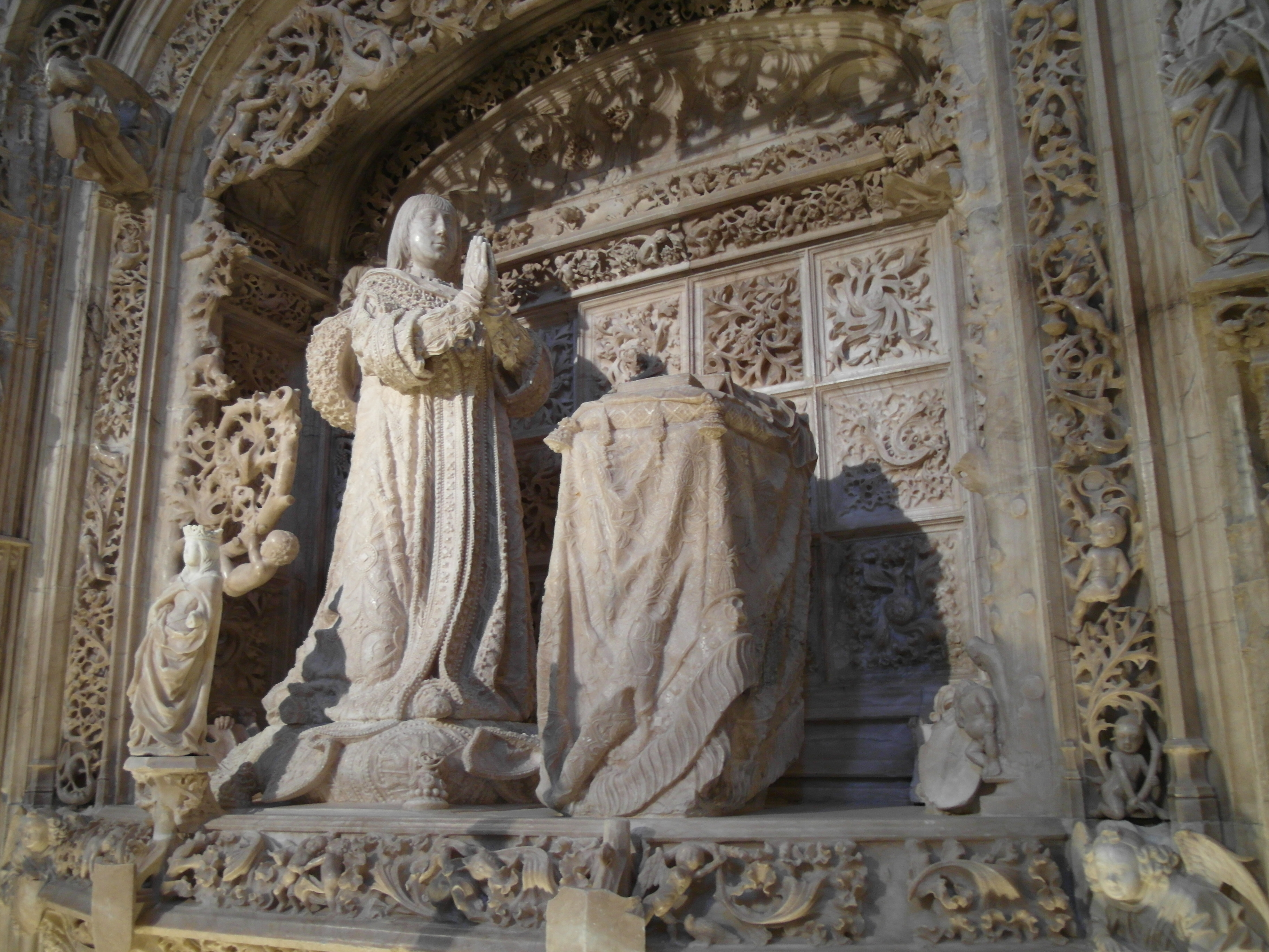 Cartuja de Miraflores, Burgos.